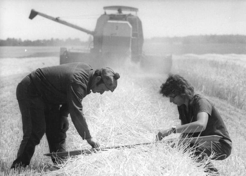 LPG Großdobritz, Ernte, Verlustprüfung "ADN-ZB Häßler 20.7.1976 Bez. Dresden: Im Staub der Mähdrescher kontrollieren Komplexleiter Helmut Henke und Erntehelfer Roland Naumann das von den Erntemaschinen ausgeworfene Stroh. Mit der ""Prüfpalette"" lassen sich Rückschlüsse auf die Siebdichte der Dreschwerke ziehen. Durch die kontinuierliche Kontrolle wollen auch die Genossenschaftsbauern der LPG Großdobritz, Kreis Meißen, ihre Ernte so verlustarm wie möglich bergen."